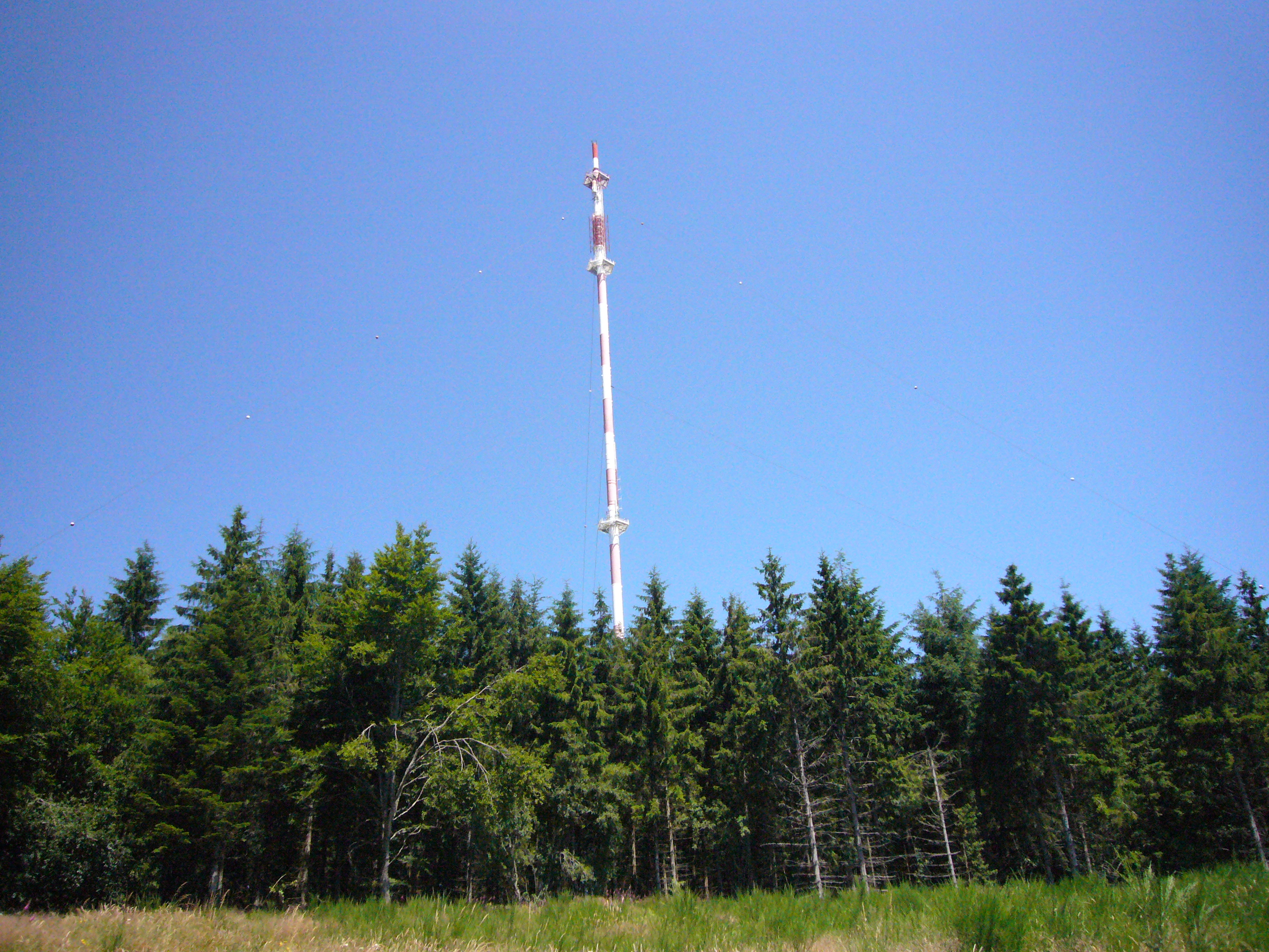 Emetteur du Mont-Bessou, 200m (Corrèze (19), France)